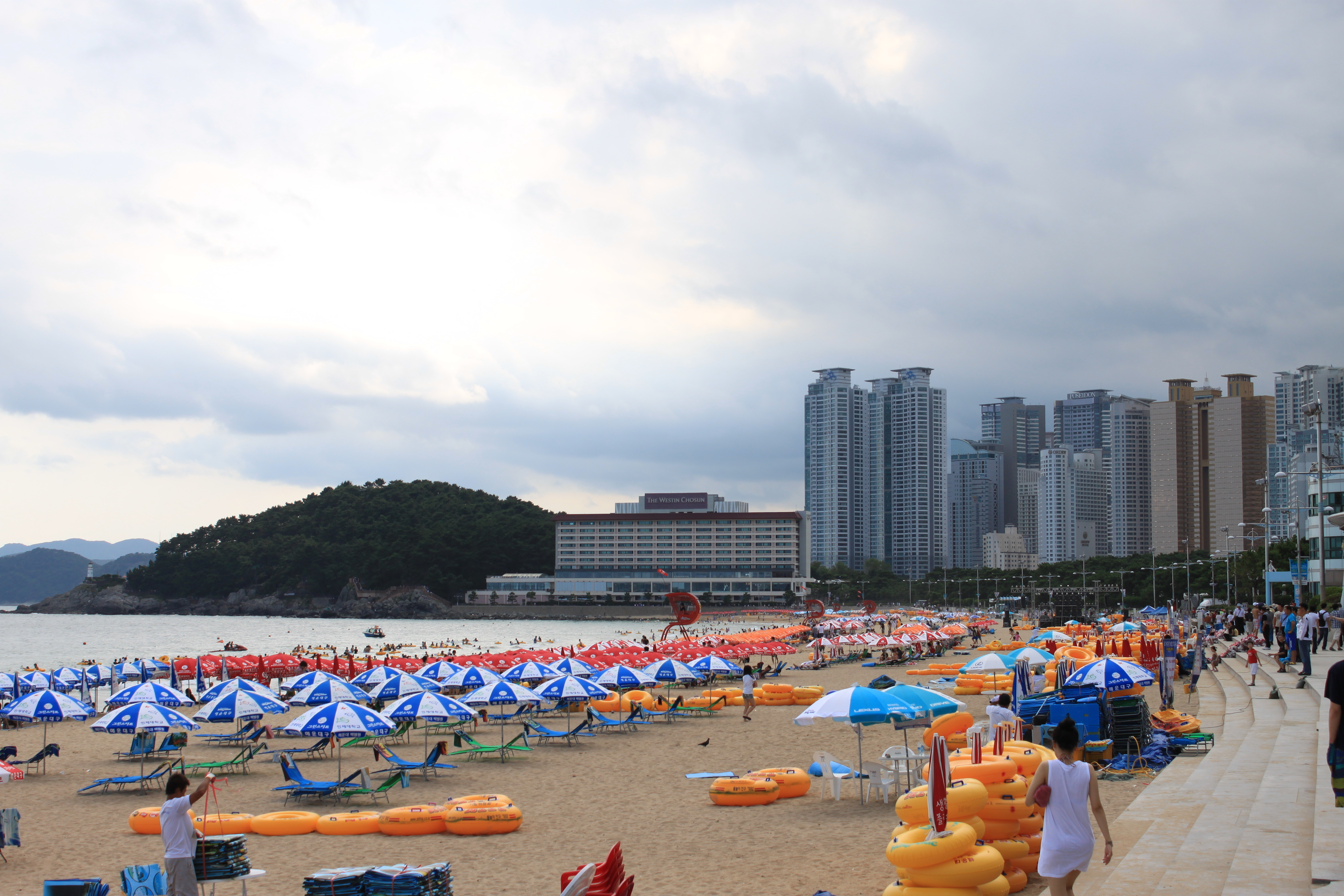 Haeundae Beach